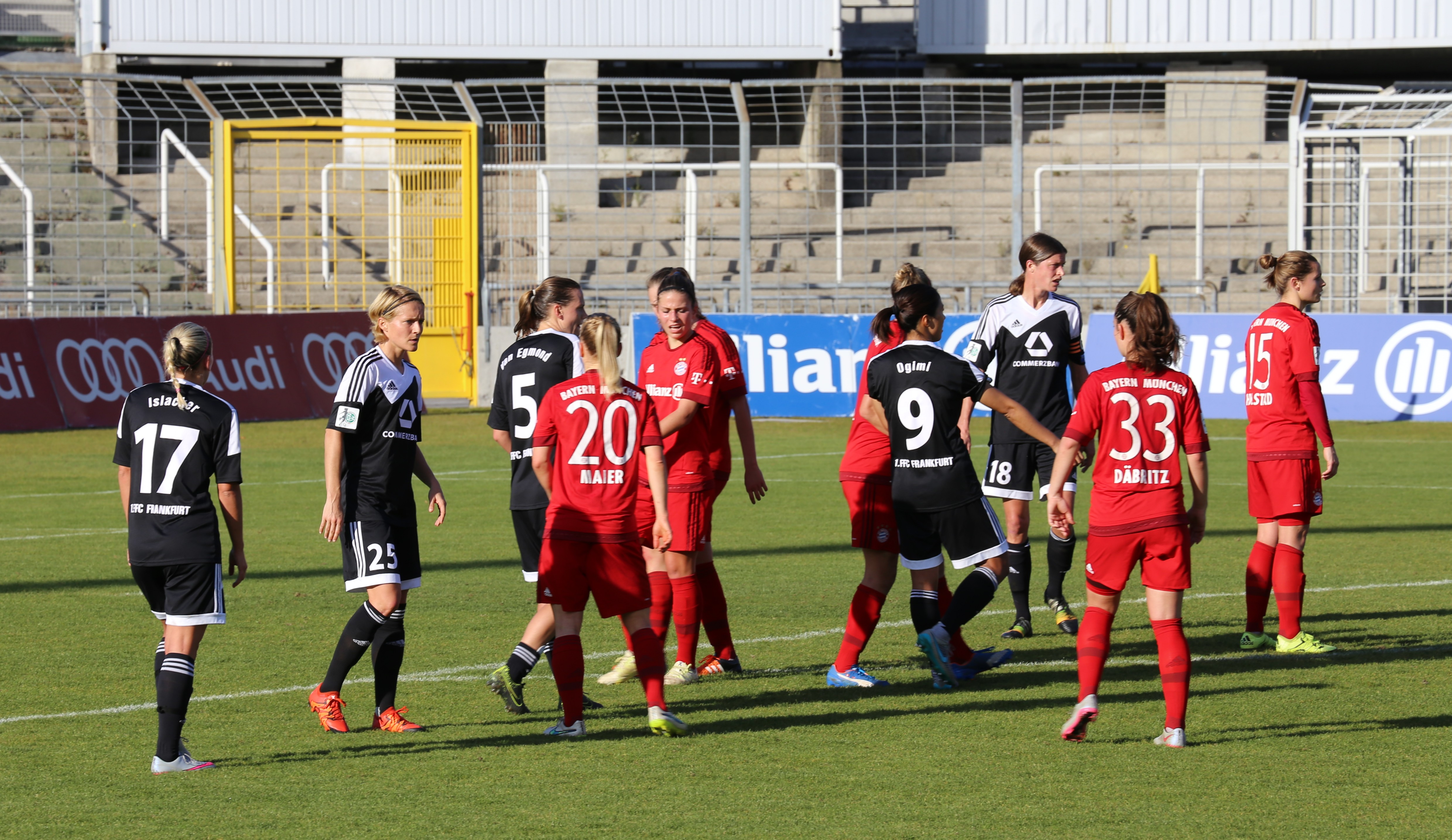 Spielszene im DFB-Pokal-Achtelfinale zwischen FC Bayern München und 1. FFC Frankfurt, Ergebnis 2:0, Stadion an der Grünwalder Straße